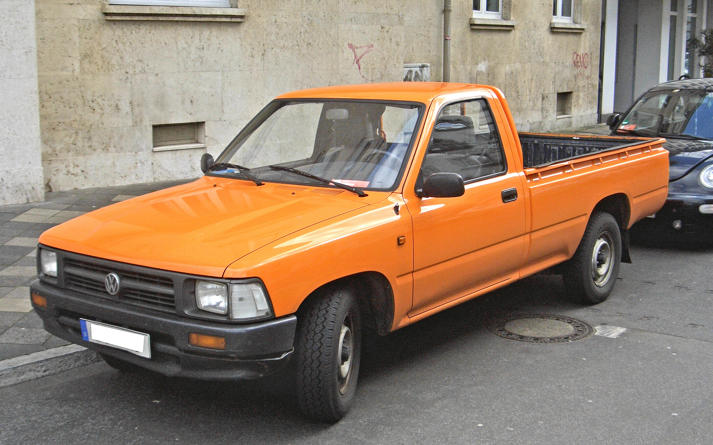 VW Taro, 1989-1997, seen in Duesseldorf, Germany